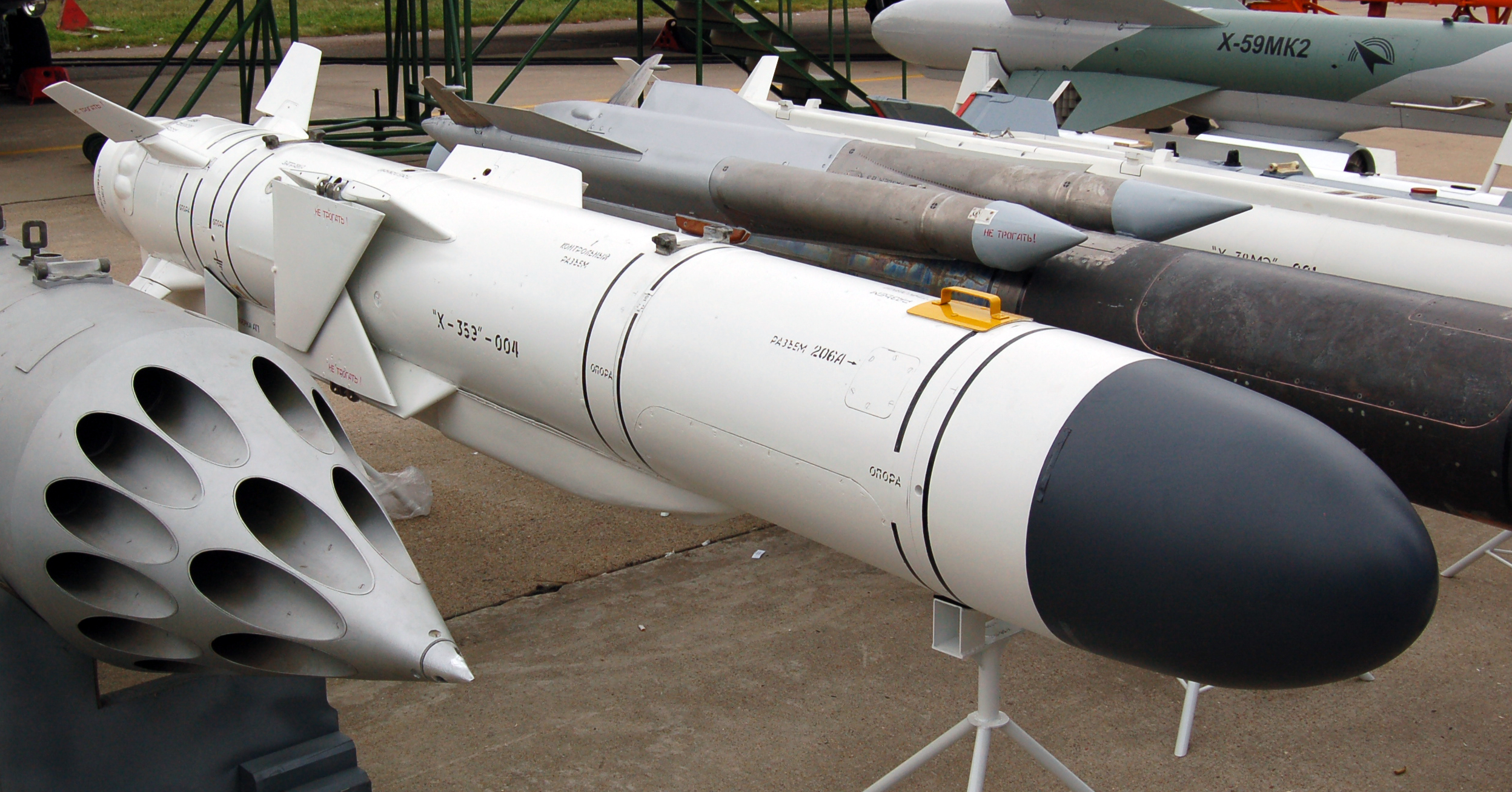 Противокорабельная ракета Х-35Э на МАКС-2009.